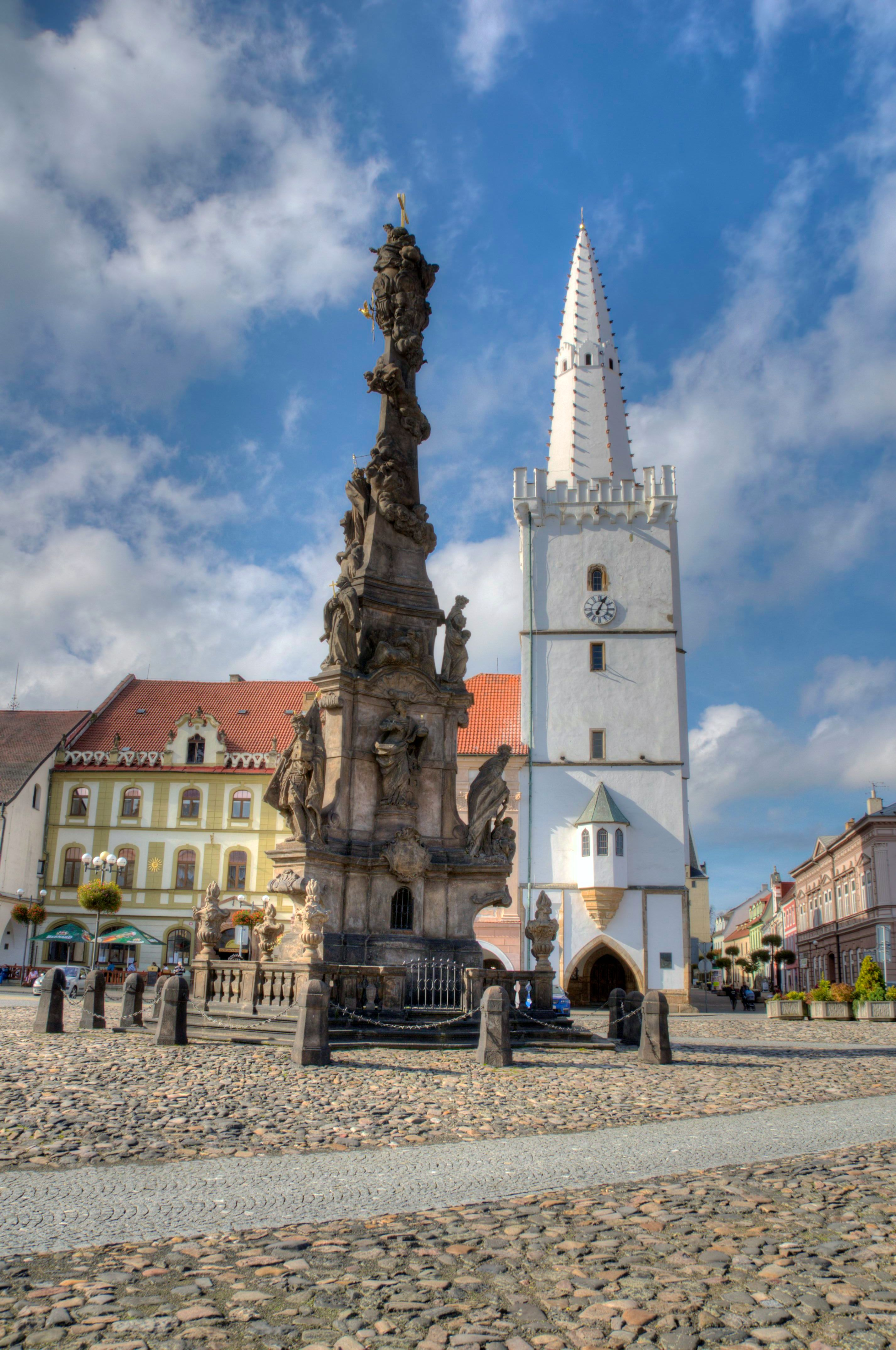 Sloup se sousoším Nejsvětější Trojice, Mírové náměstí, Kadaň.